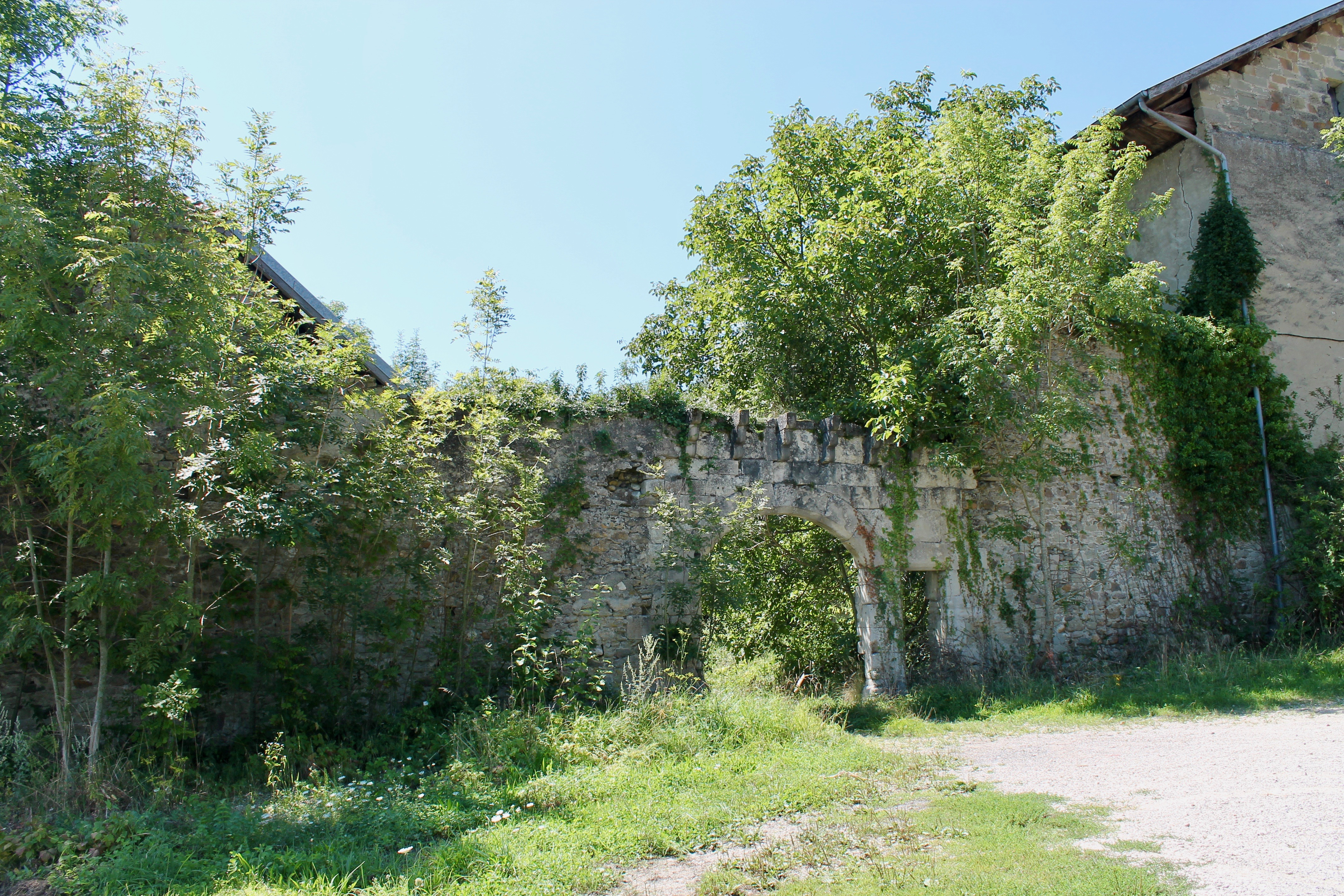 Ruines de la maison forte de Mionnaz (début du Template:S-), située sur la commune française de Menthonnex-sous-Clermont (Haute-Savoie).